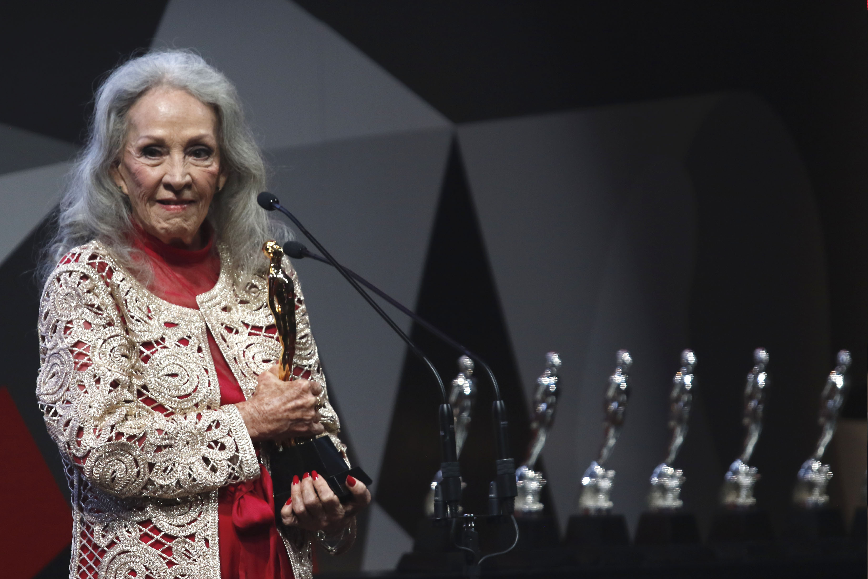 Martes 11 de julio de 2017. En el Palacio de Bellas Artes, se realizó la ceremonia número 59 de la entrega de Premios de la Academia Mexicana de Cinematografía, Ariel. Encabezado por su presienta la actriz Dolores Heredia. ARIEL DE ORO, Actriz Isela Vega. Fotografía: Milton Martínez / Secretaría de Cultura CDMX.